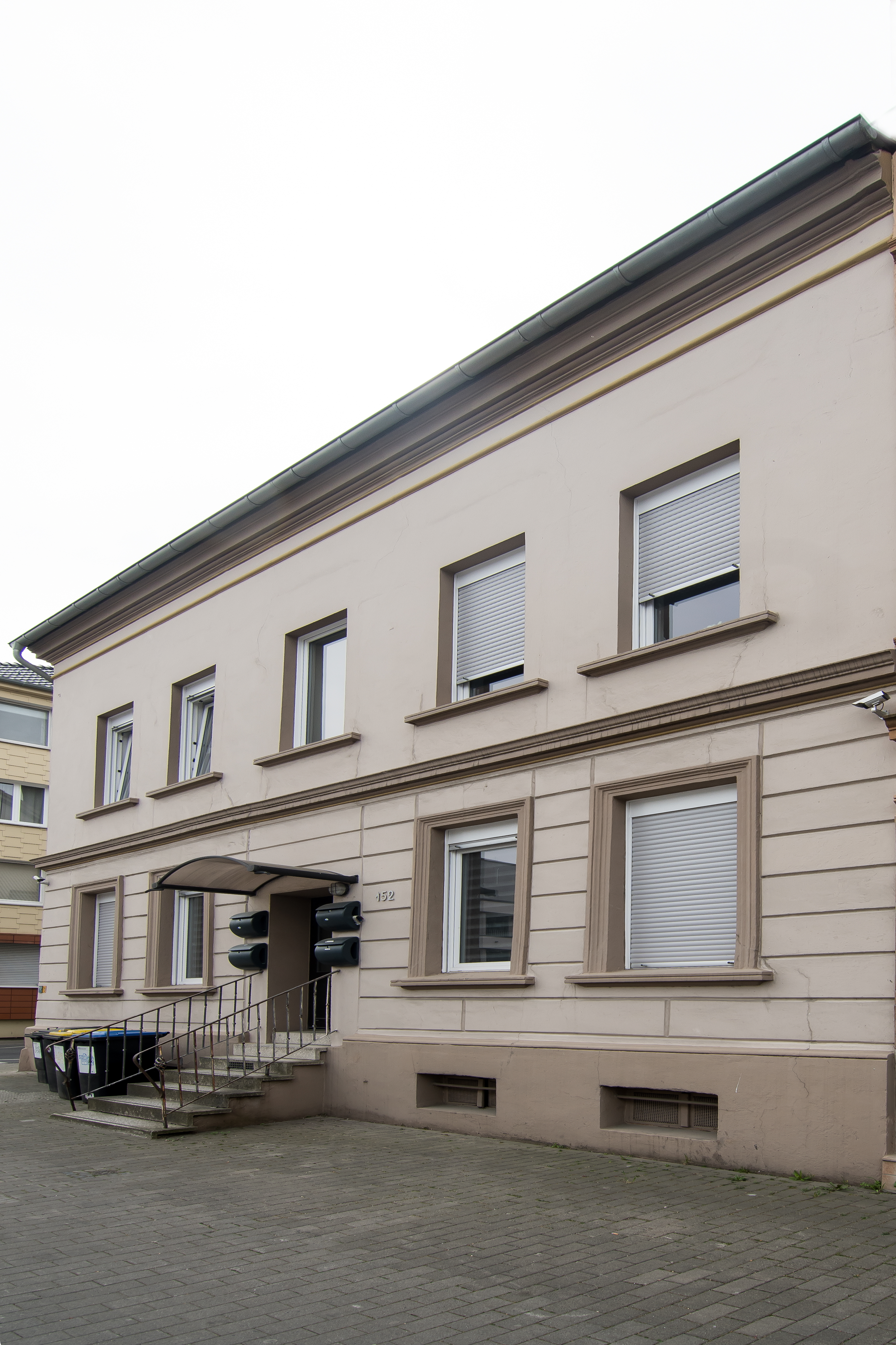 Wohnhaus der Familie Lewy in Dortmund